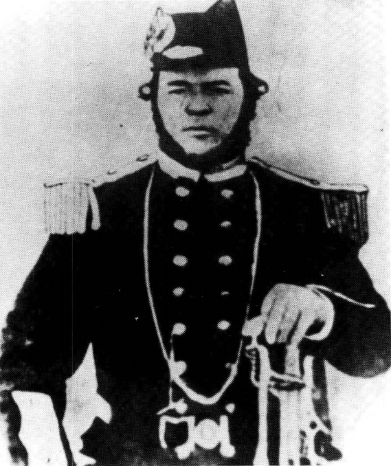 João Albasini